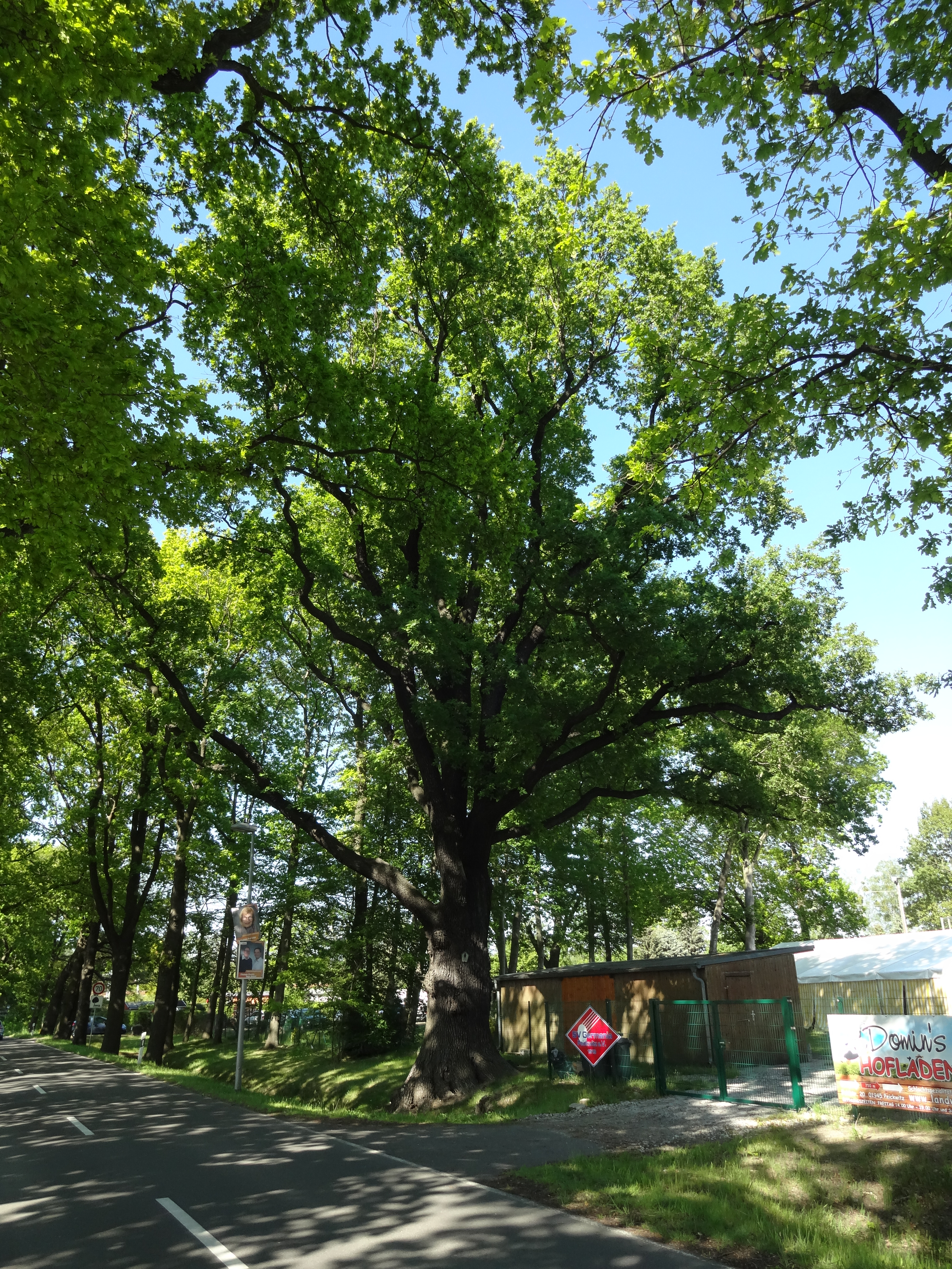 als Naturdenkmal geschützte Stieleiche am Sportplatzrand in Peickwitz